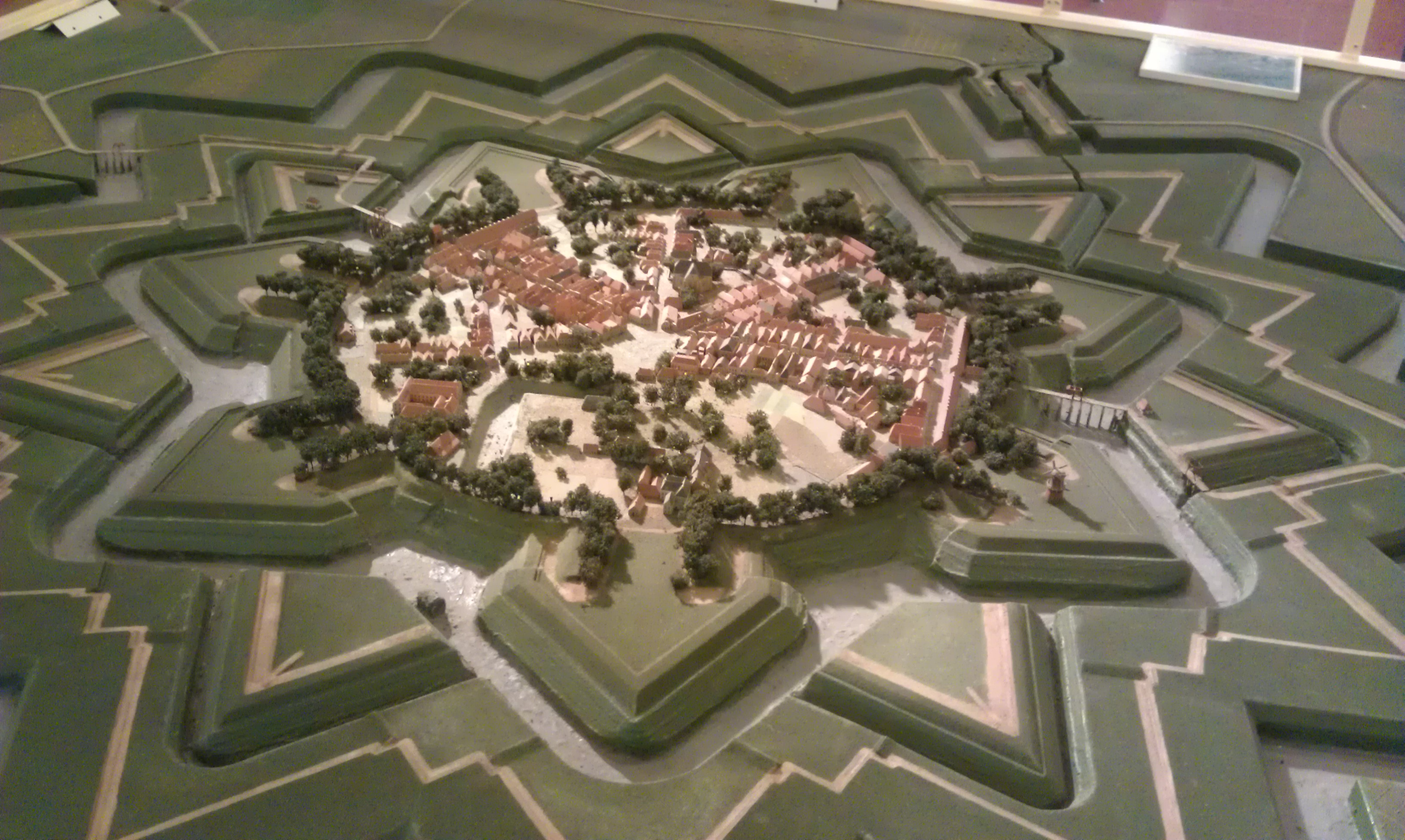 Maquette van de vestingwerken van Coevorden in het Stedelijk Museum Coevorden